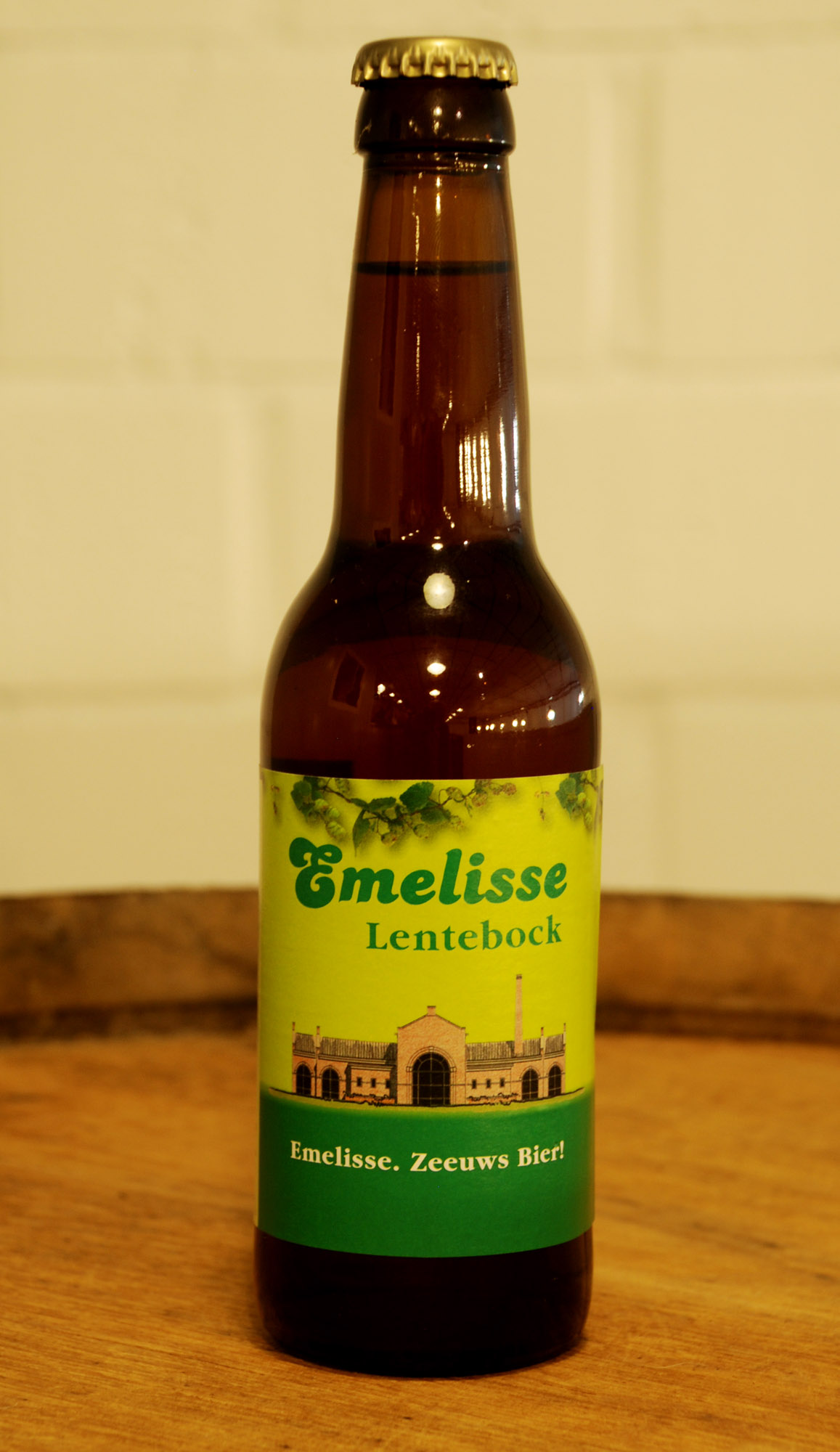 Lentebock, brouwerij Emelisse, Nederland